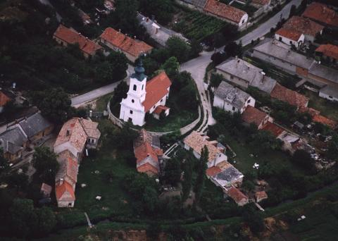 Vilonya, Hungary, aerialphotgraphy